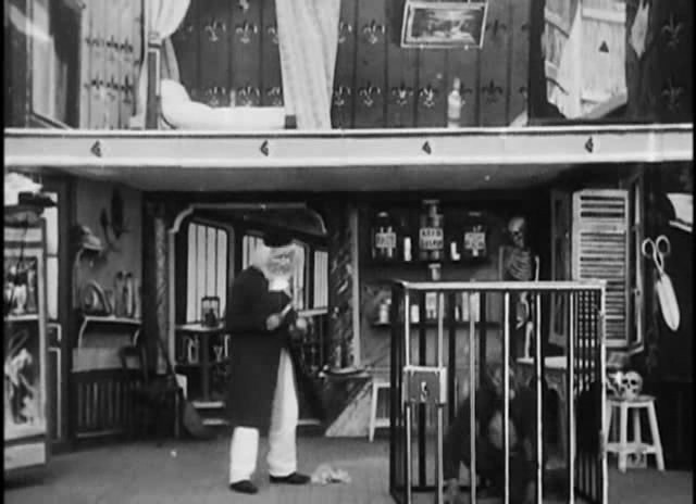 Photo du film "le savant et le chimpanzé" (1900) de Georges Méliès